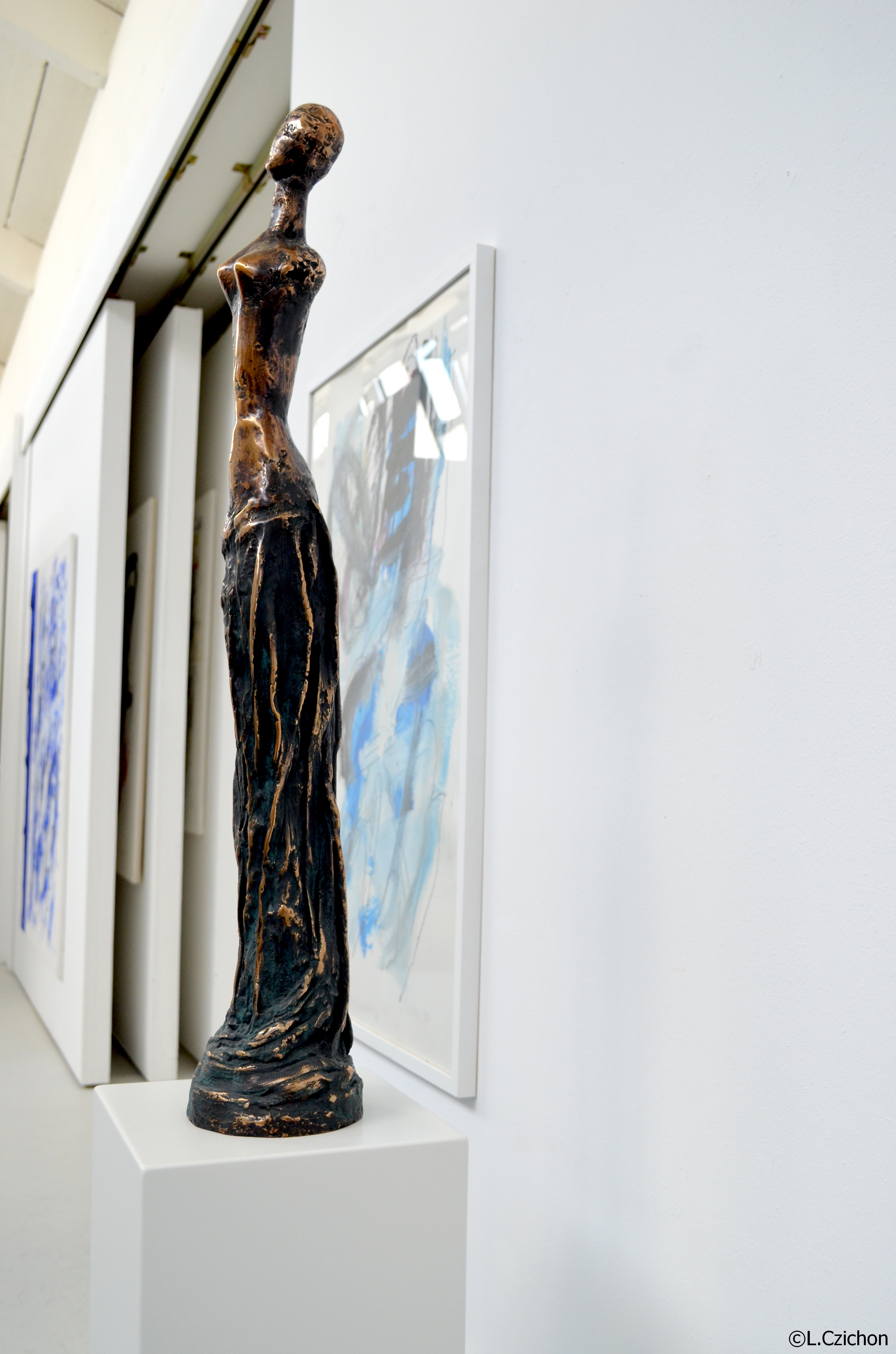 Bronze